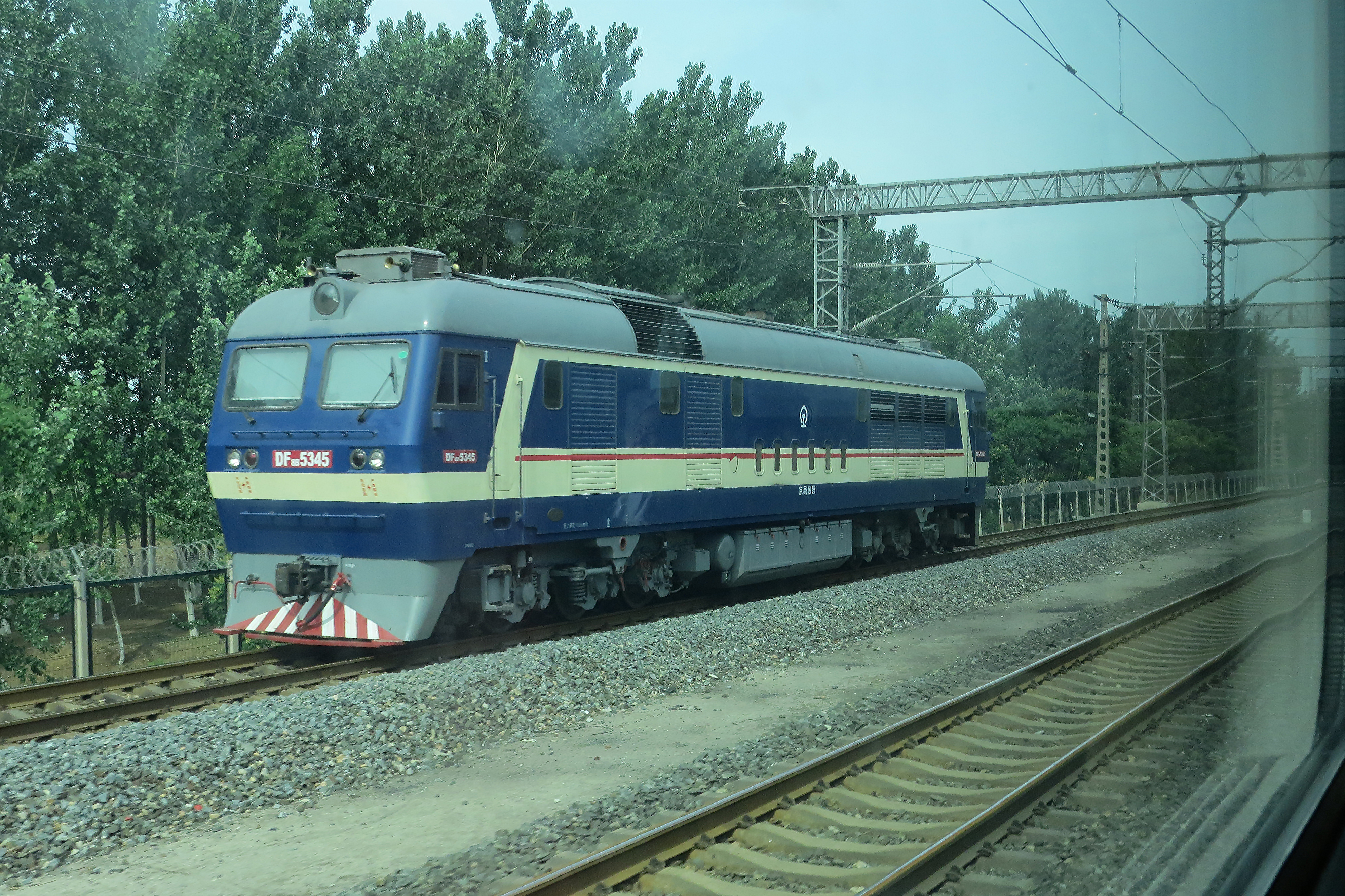 配属京局唐段的DF8B-5345在别山站